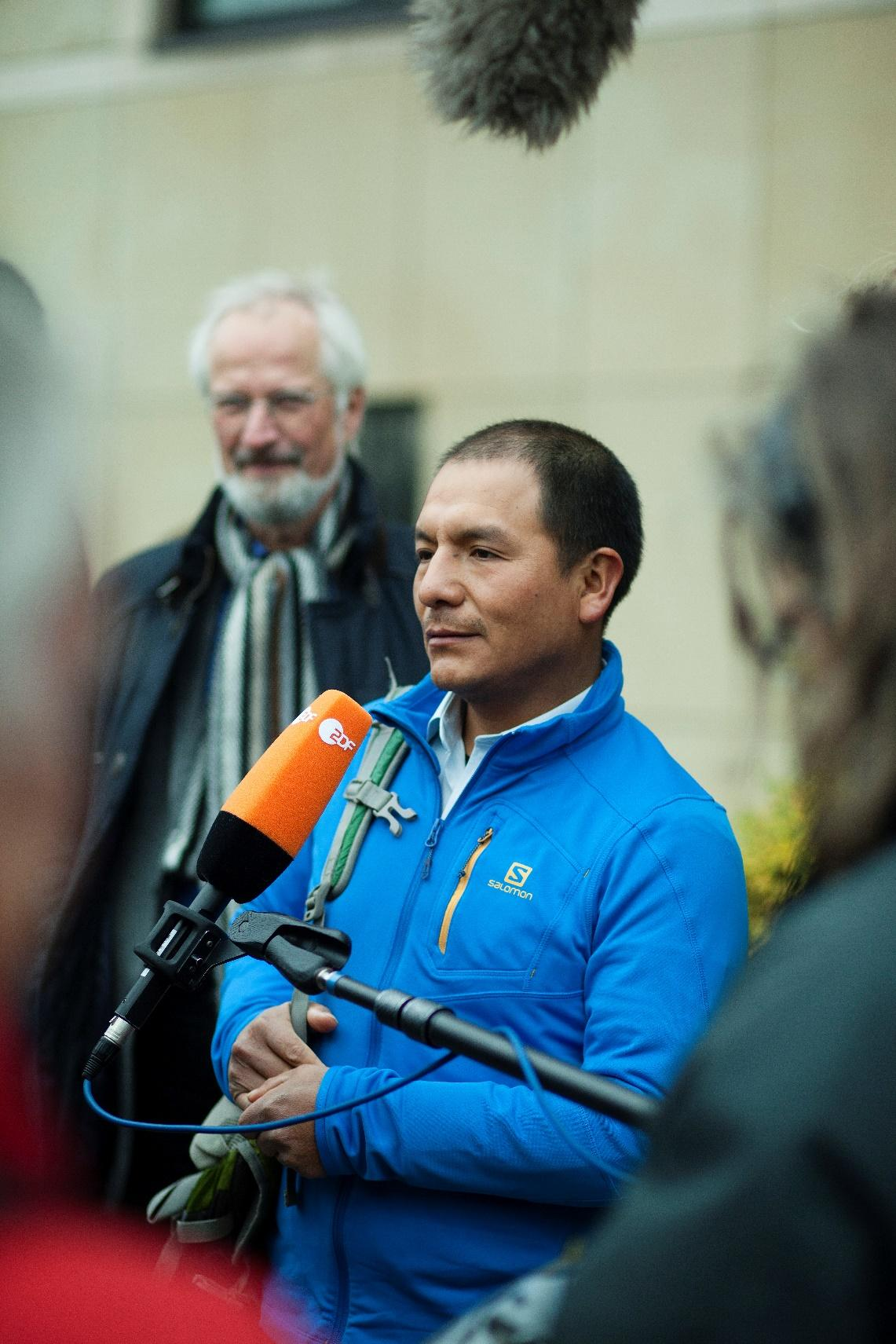 Saúl Luciano es un campesino y guía de montaña peruano que ha demandado a la firma transnacional energética alemana RWE por contribuir al calentamiento global a través de sus emisiones de CO2 que contribuyen al retroceso glaciar en la Cordillera Blanca en Perú aumentando el riesgo de un desborde violento de la laguna glaciar Palcacocha que afectará la vida de miles de personas en Huaraz, Áncash.